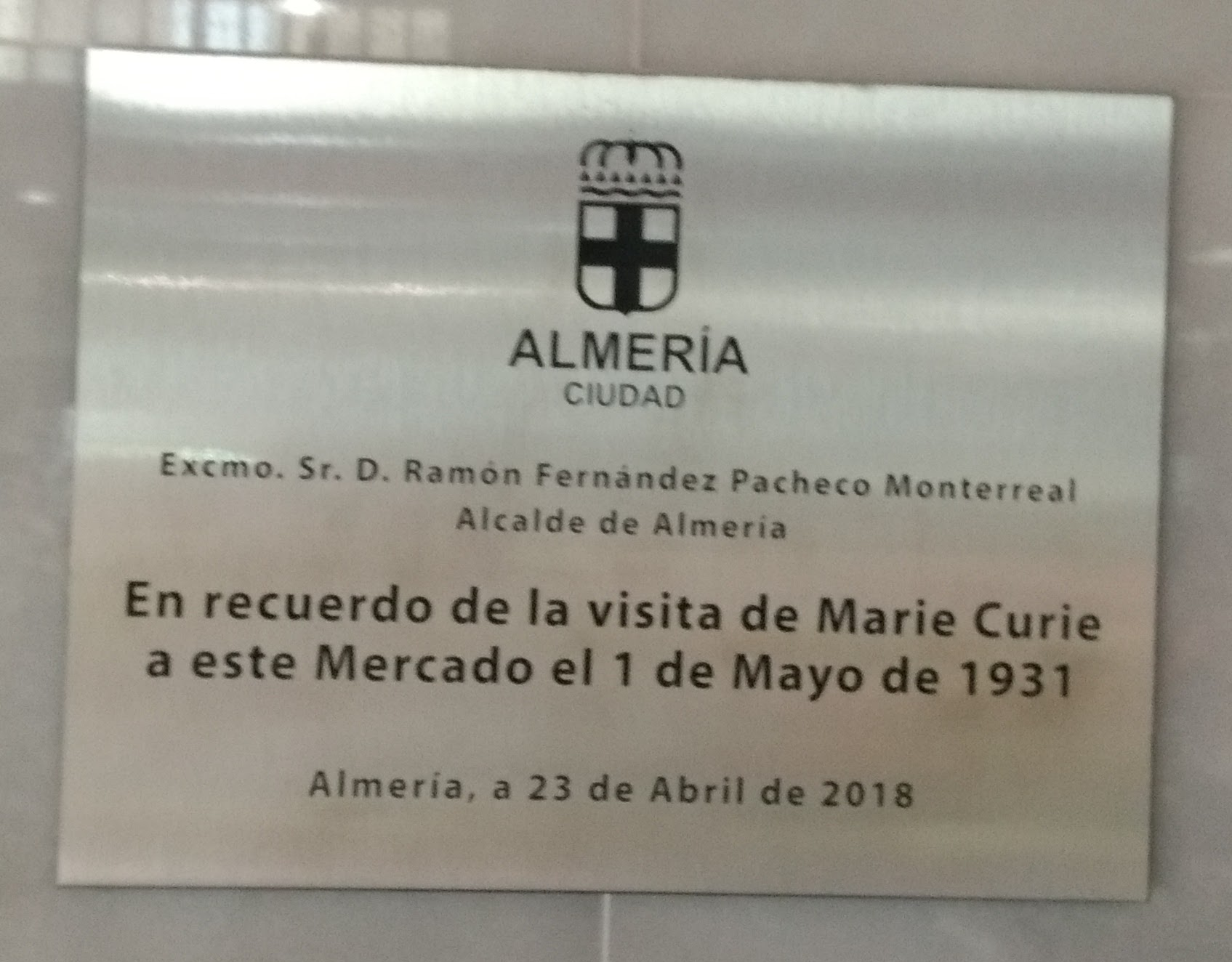 Placa conmemorativa en el mercado central de Almería en recuerdo de la visita de Marie Curie a la ciudad el 1 de mayo de 1931